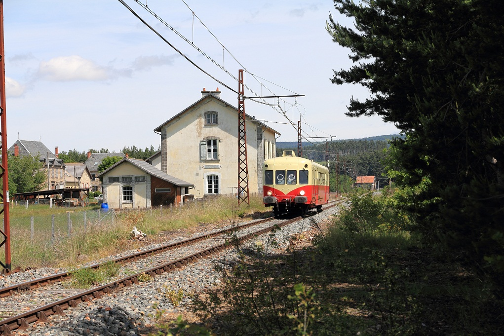 L'X 2403 de passage en gare de Ruynes-en-Margeride en juin 2011, Cantal, France.